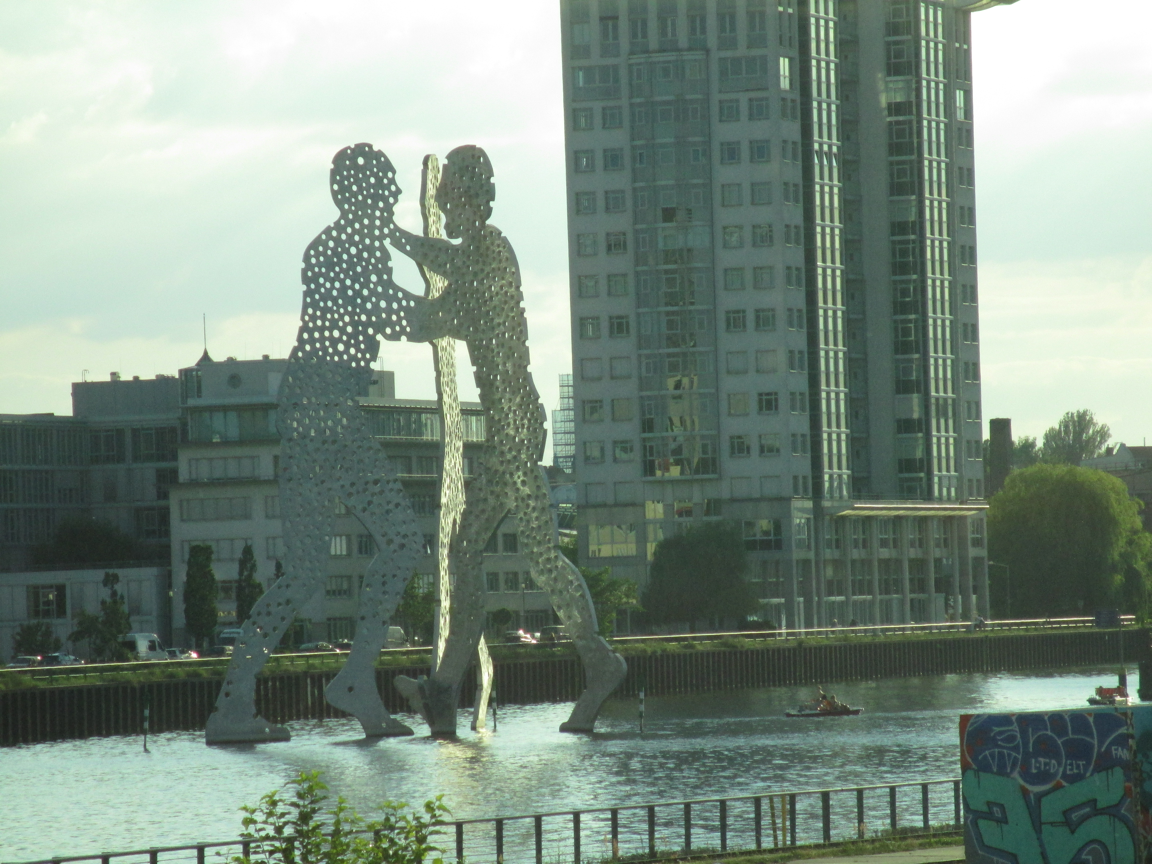 פסל איש המולקולה על נהר שפרה בברלין